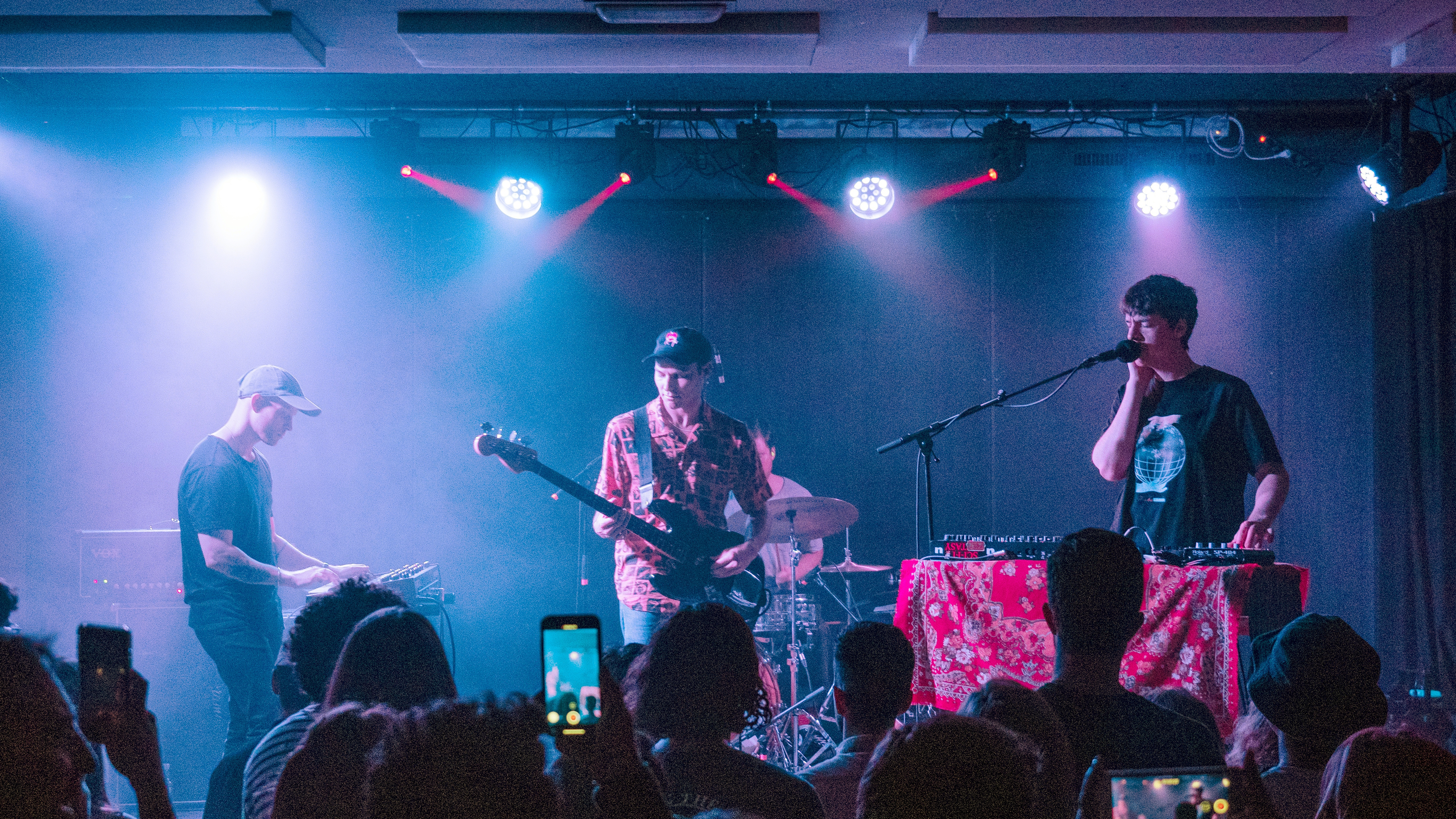 2019/05/30 Dabadaba HOMESHAKE Antolatzailea: Dabadaba Laguntzaileak:Donostia Kultura Argazkilaria: Josu De La Calle